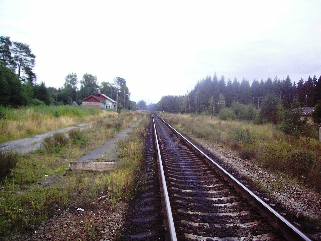 Перрон станции Cуйстамо